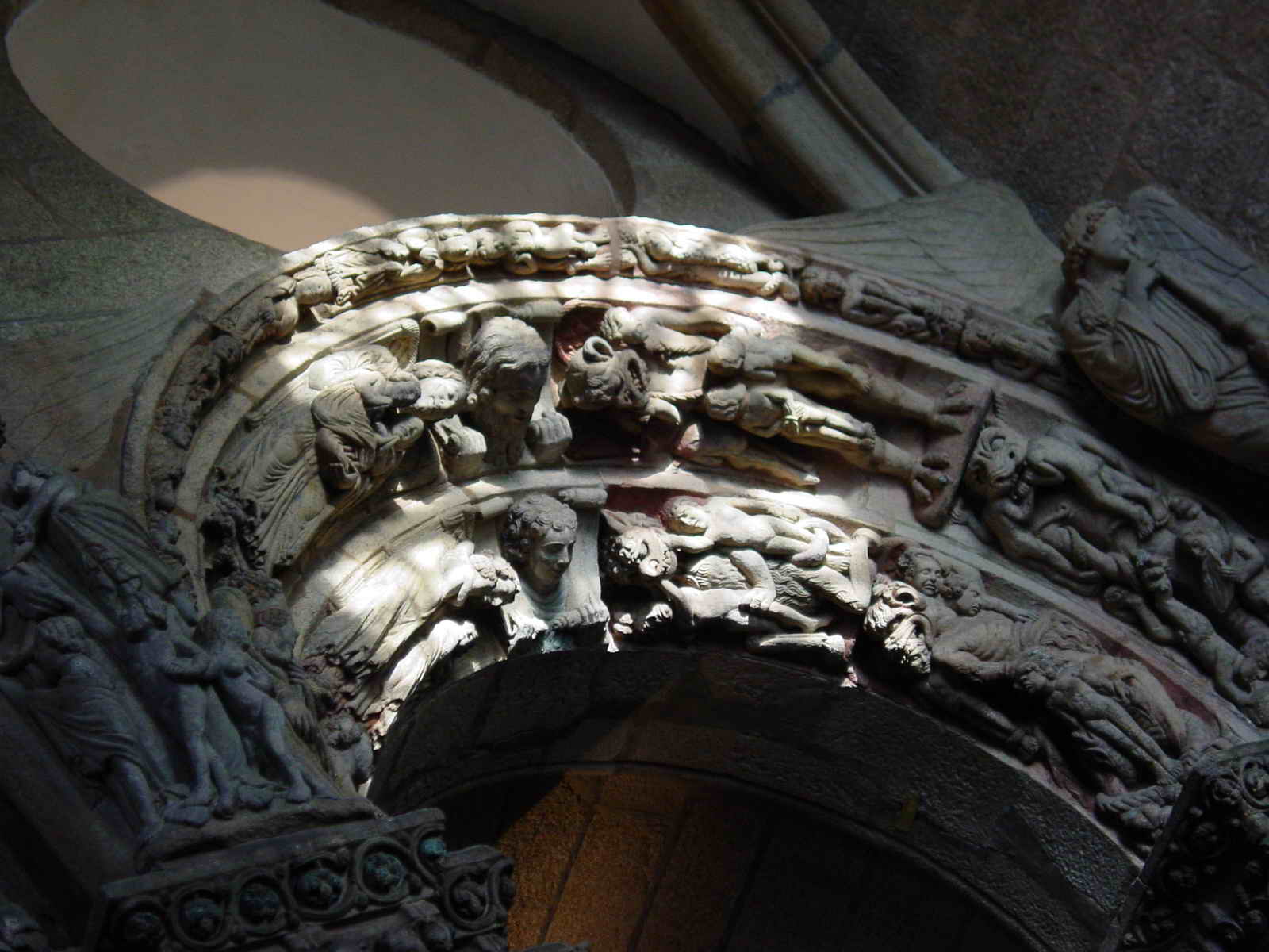 Santiago de Compostela - Galicia - España (Spain)